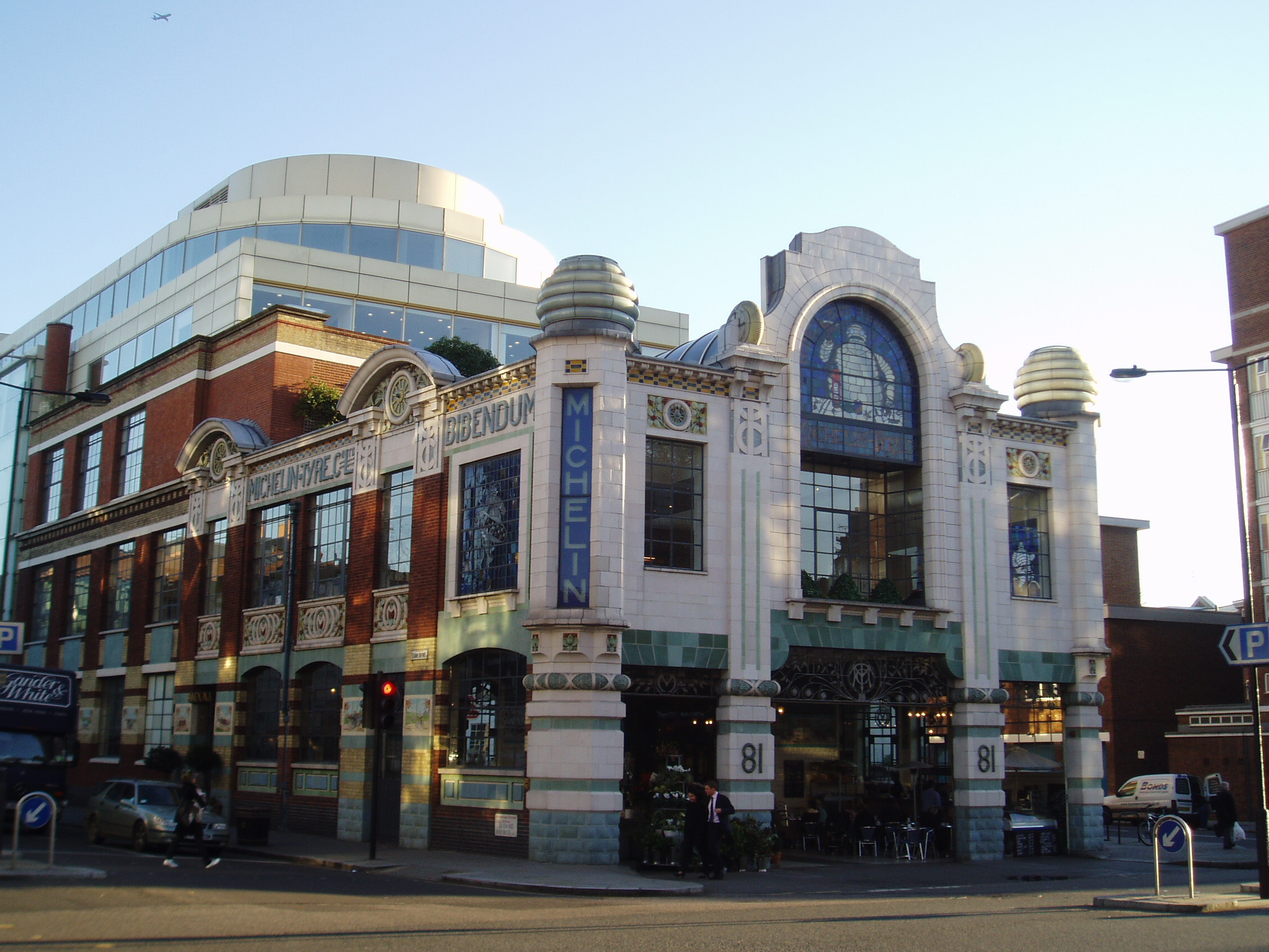 Bibendum, The Michelin Building